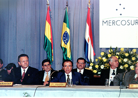 El presidente Carlos Menem participó de la XII Cumbre de Presidentes del Mercosur, donde se debatieron las prioridades para profundizar la integración económica regional.